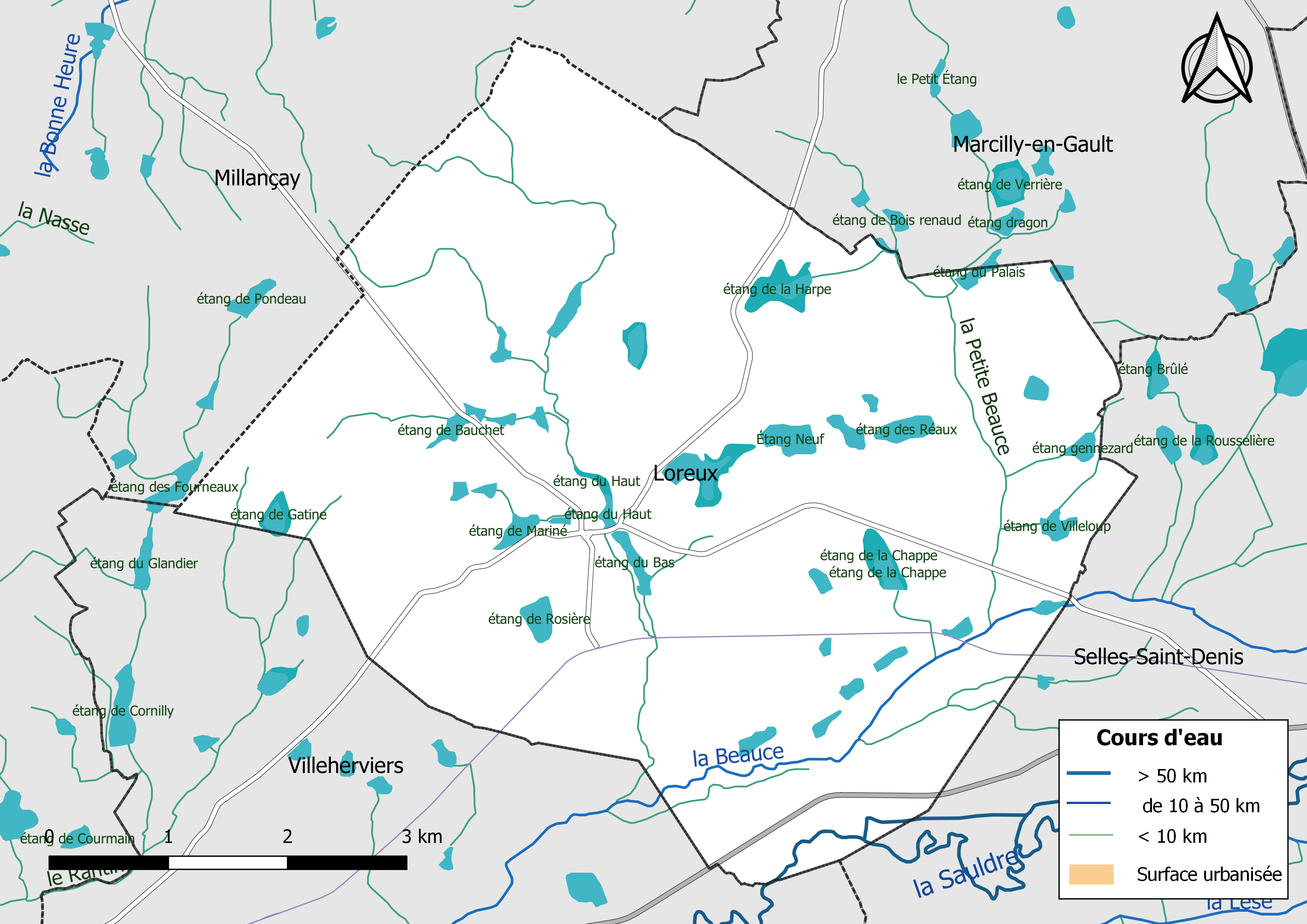 Carte du réseau hydrographique de la commune de Loreux (France).